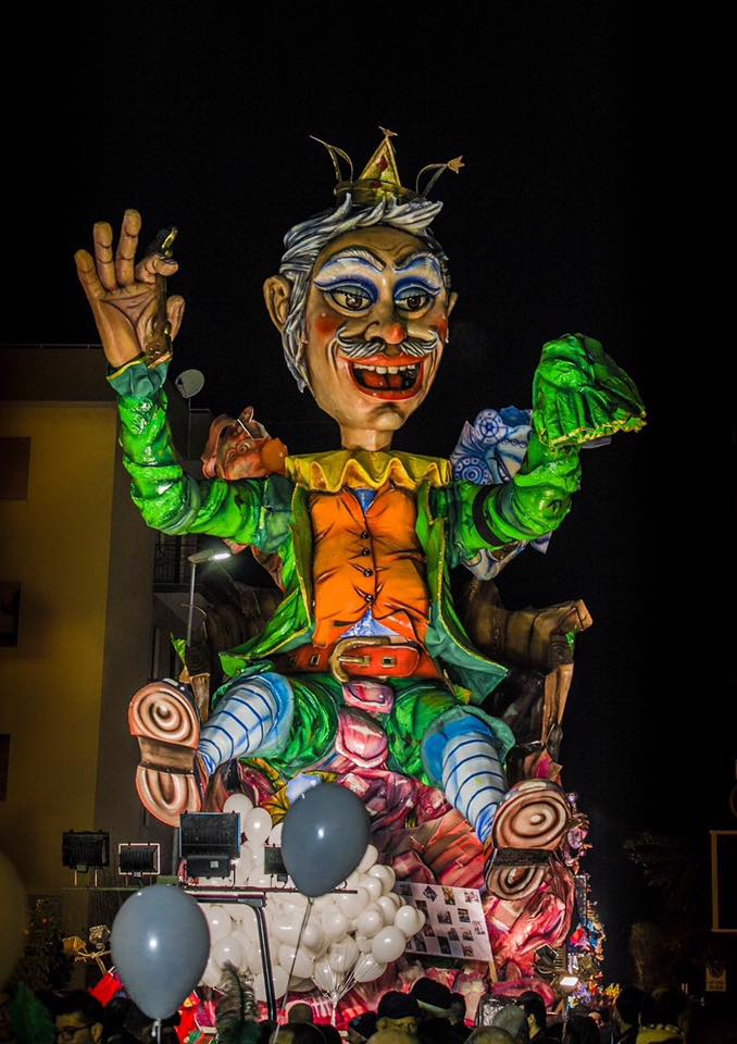 Carro del Peppe Nappa a Sciacca, carnevale 2016